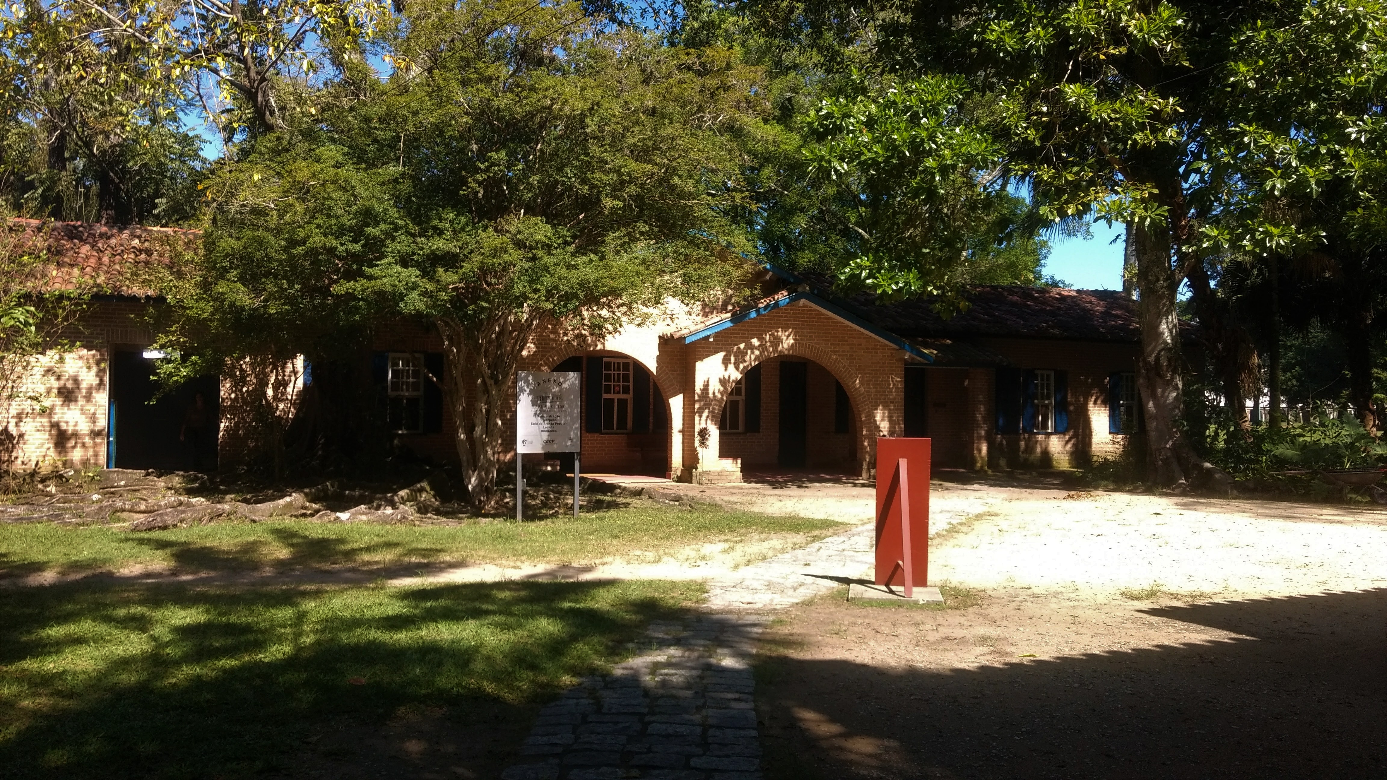 Fachada da casa dois (anexo) do Museu do Folclore de São José dos Campos, Brasil.